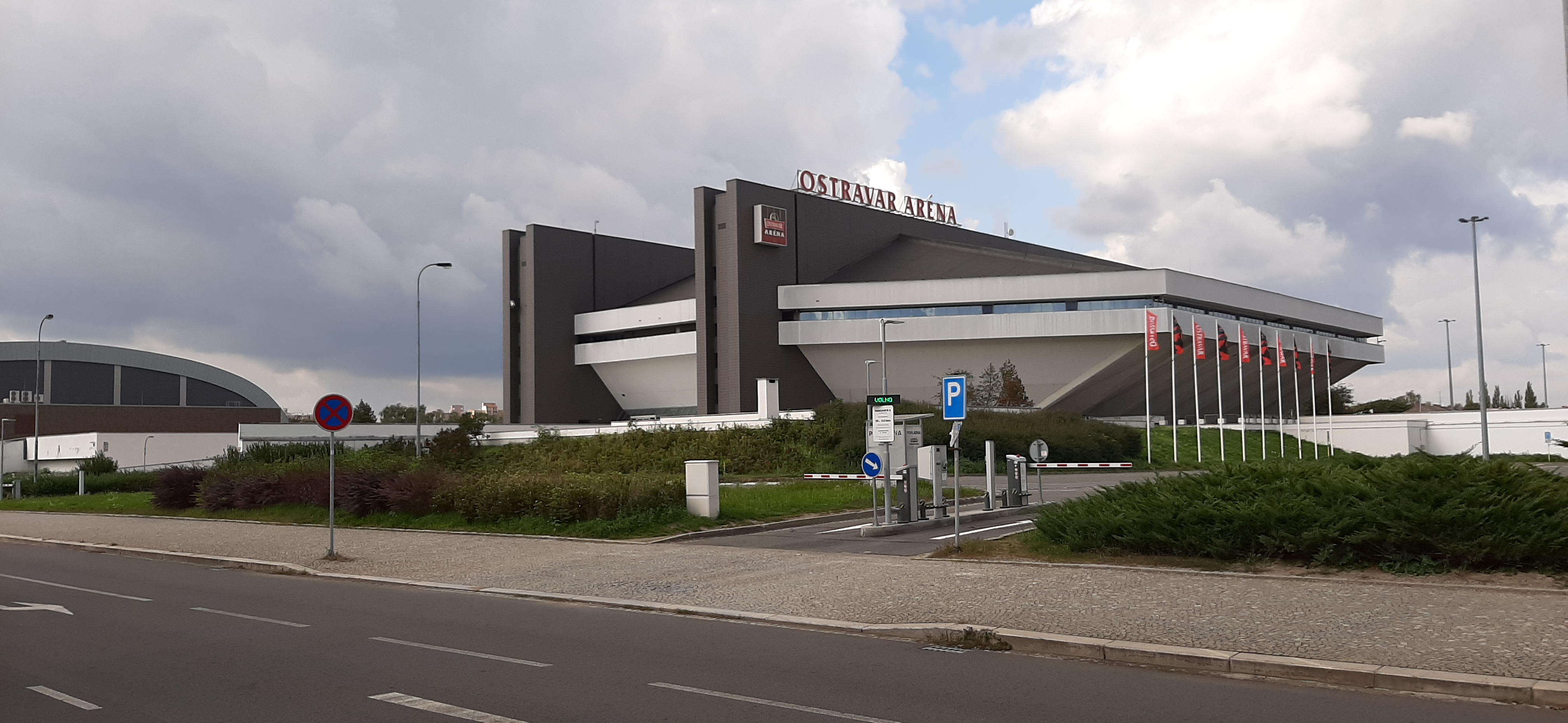 Objekt ostravské Ostravar Arény.